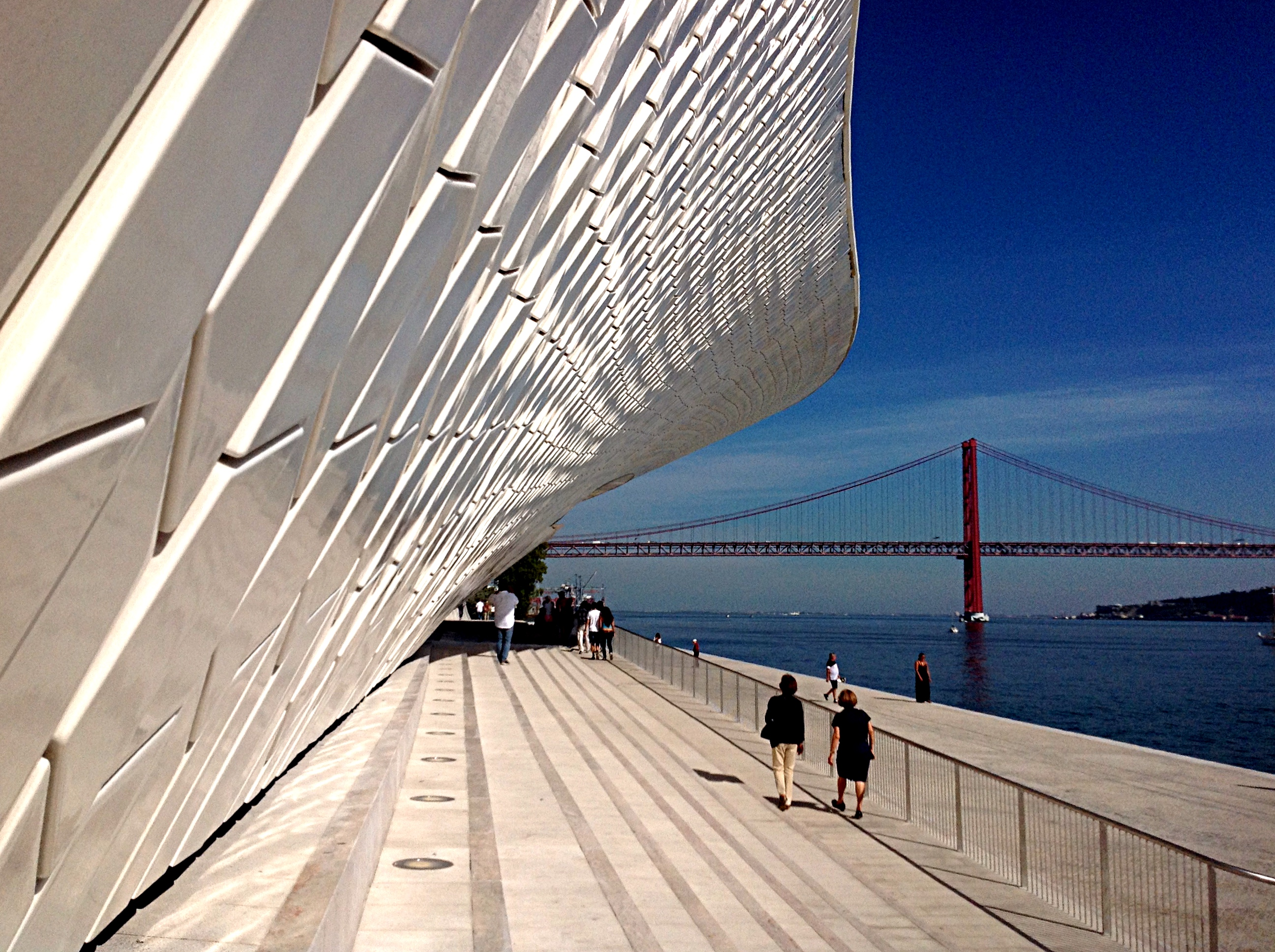 MAAT - Museu de Arte , Arquitetura , Tecnologia . Lisboa , Portugal.